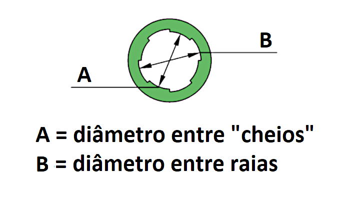 Calibre em cano estriado, mostrando o diâmetro entre as raias e entre os "cheios" do estriamento.